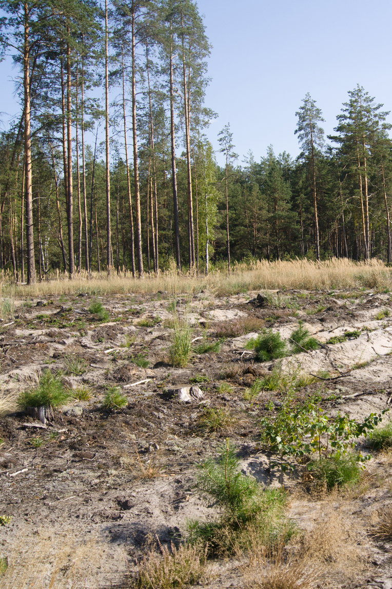 Посадка соснового леса на месте вырубки. Заказник "Муромский".